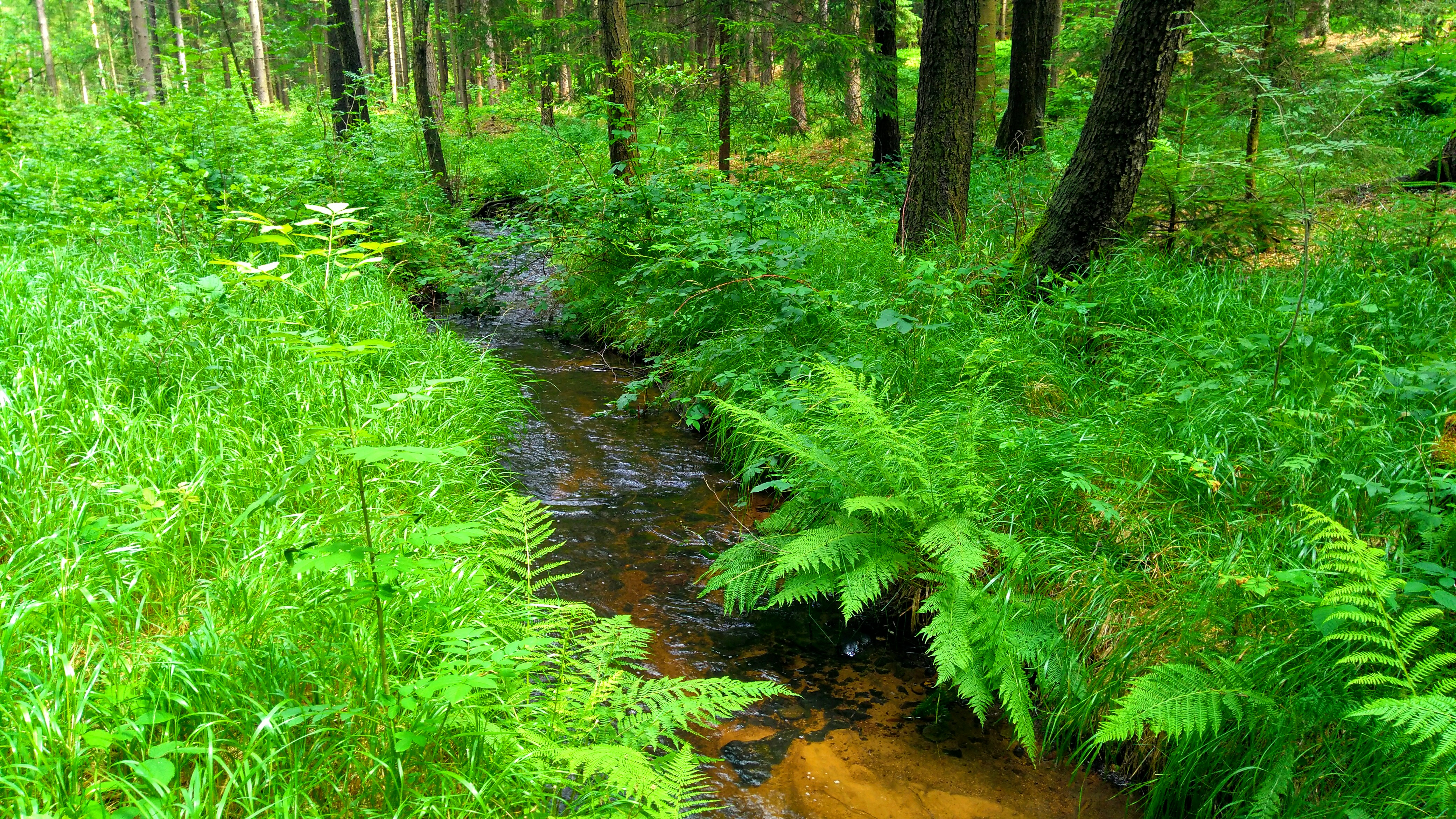 Potok.